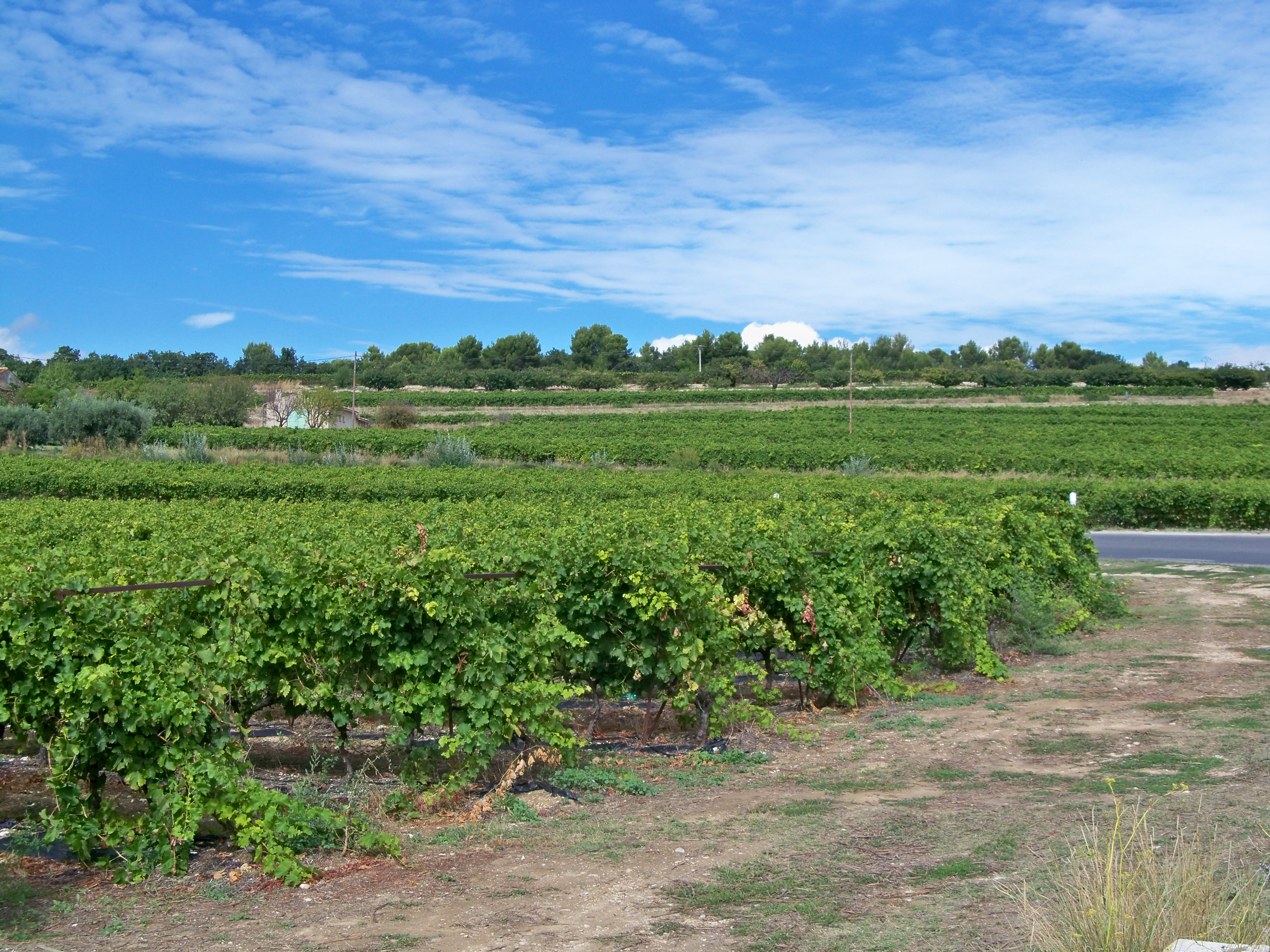 Vignoble du Ventoux, Malemort du Comtat, Vaucluse, France